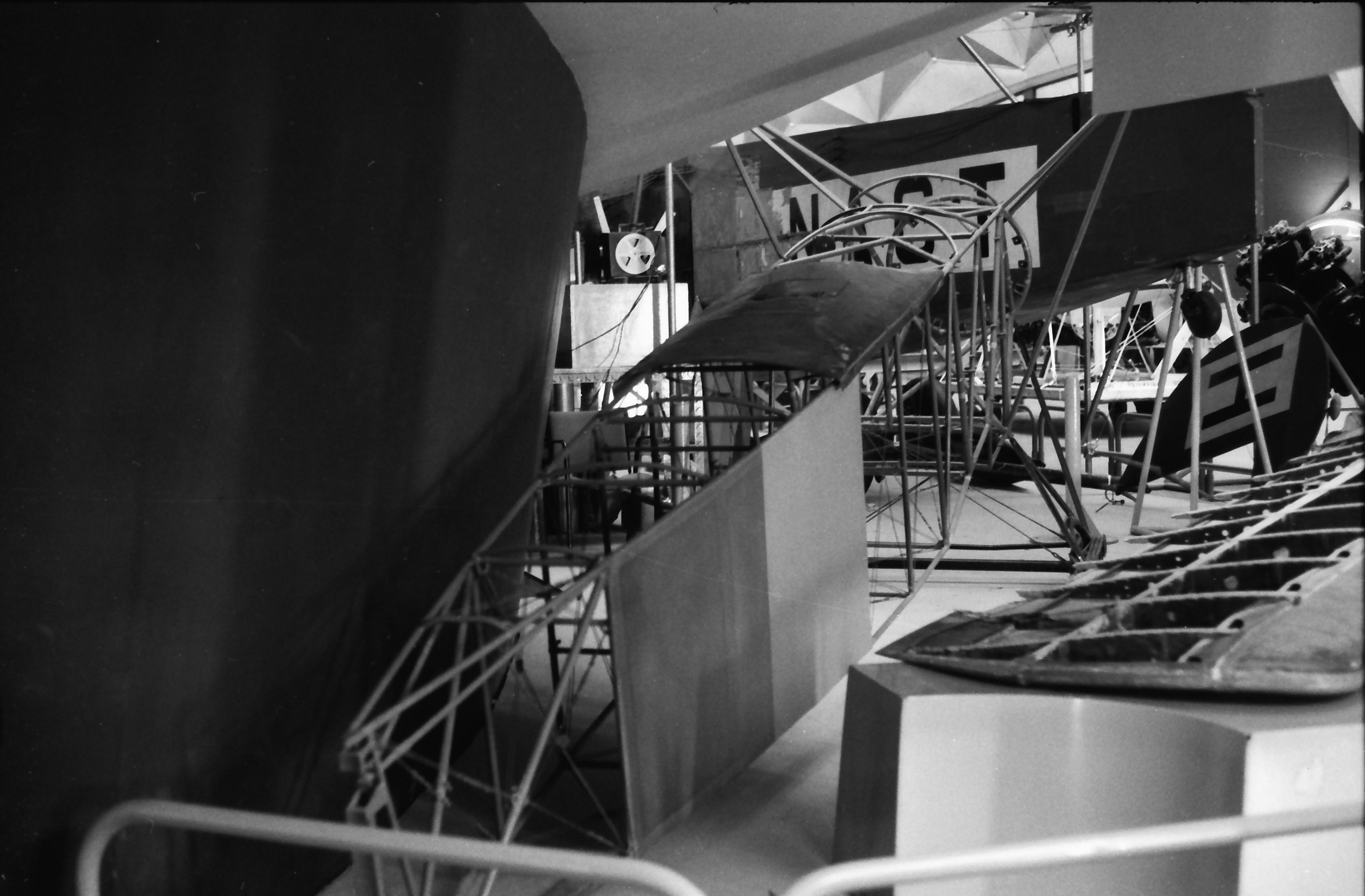 Fokker S-IV